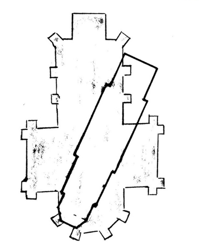 Grundriß der alten und neuen Kirche in Assinghausen (ohne Schöpfungshöhe)